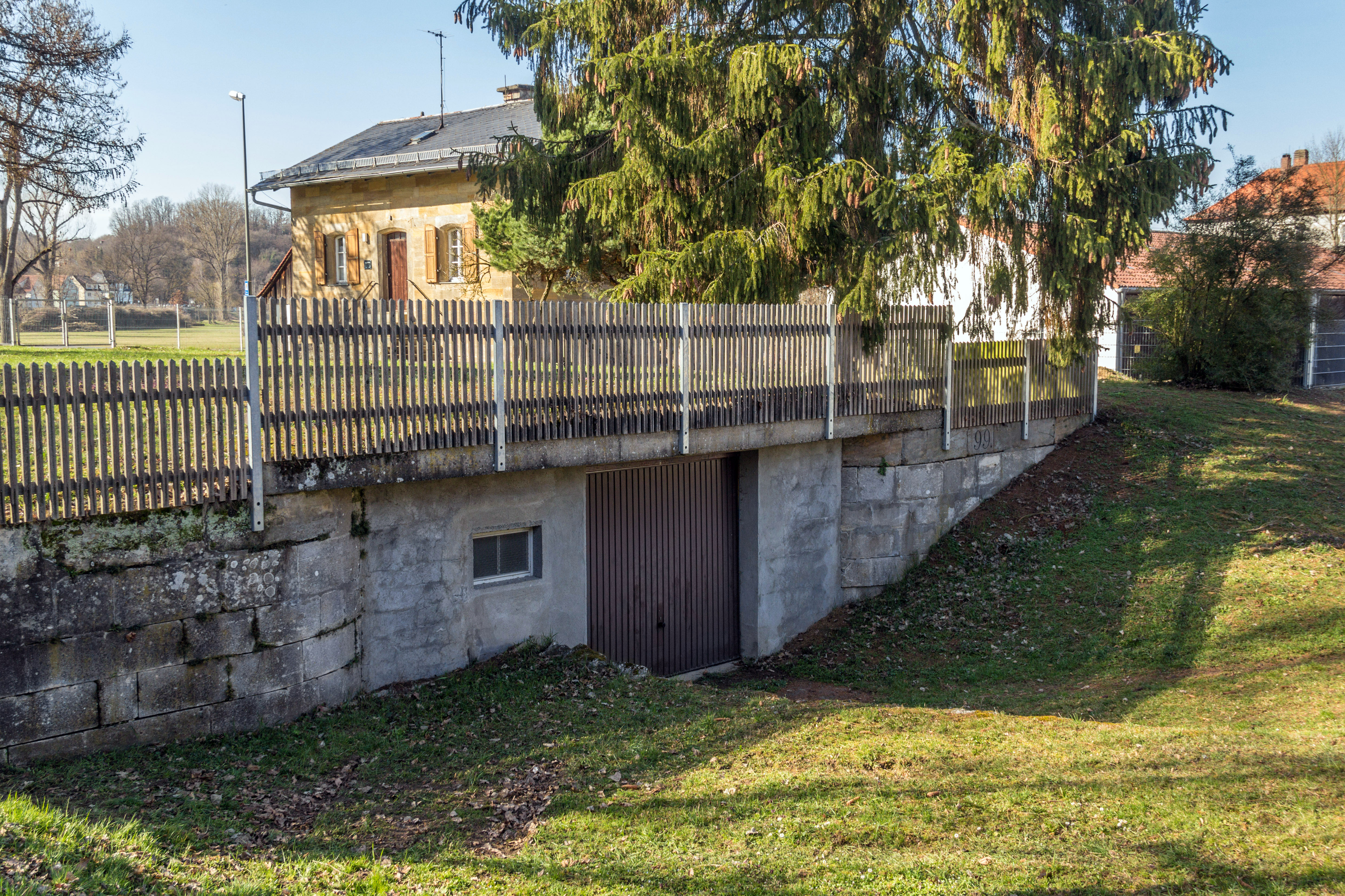 Ludwig-Donau-Main-Kanal, Bamberg, Schleuse 99, Bughof